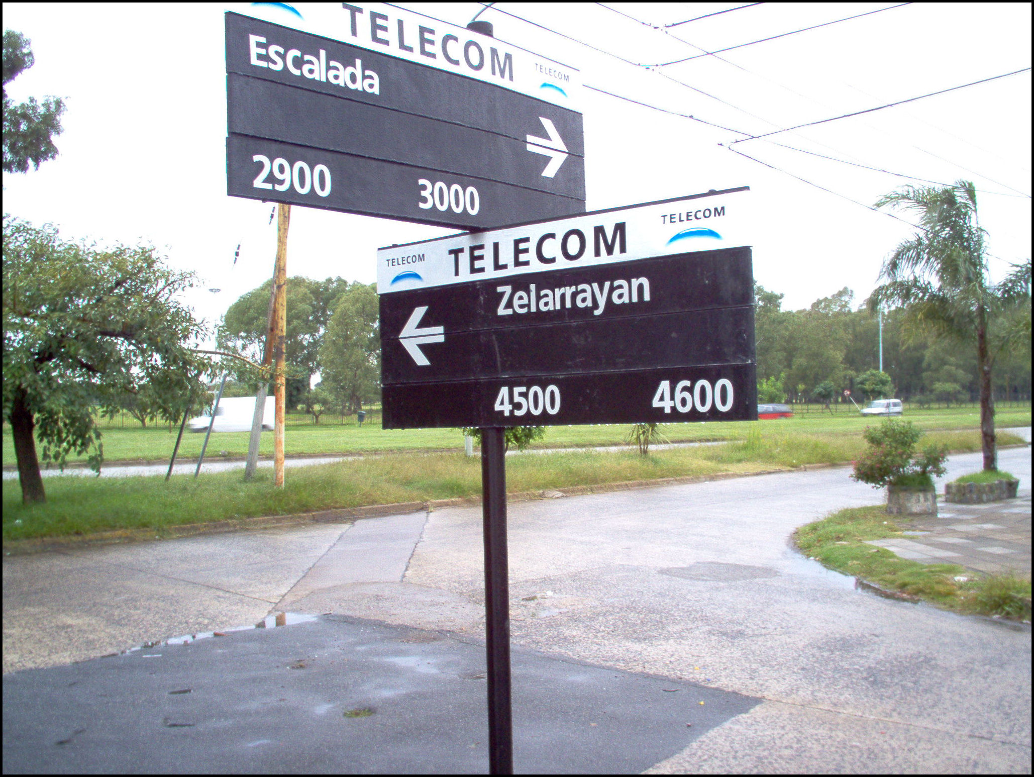 Calle en la ciudad de Buenos Aires cuyo nombre conmemora al coronel Juan Zelarayán